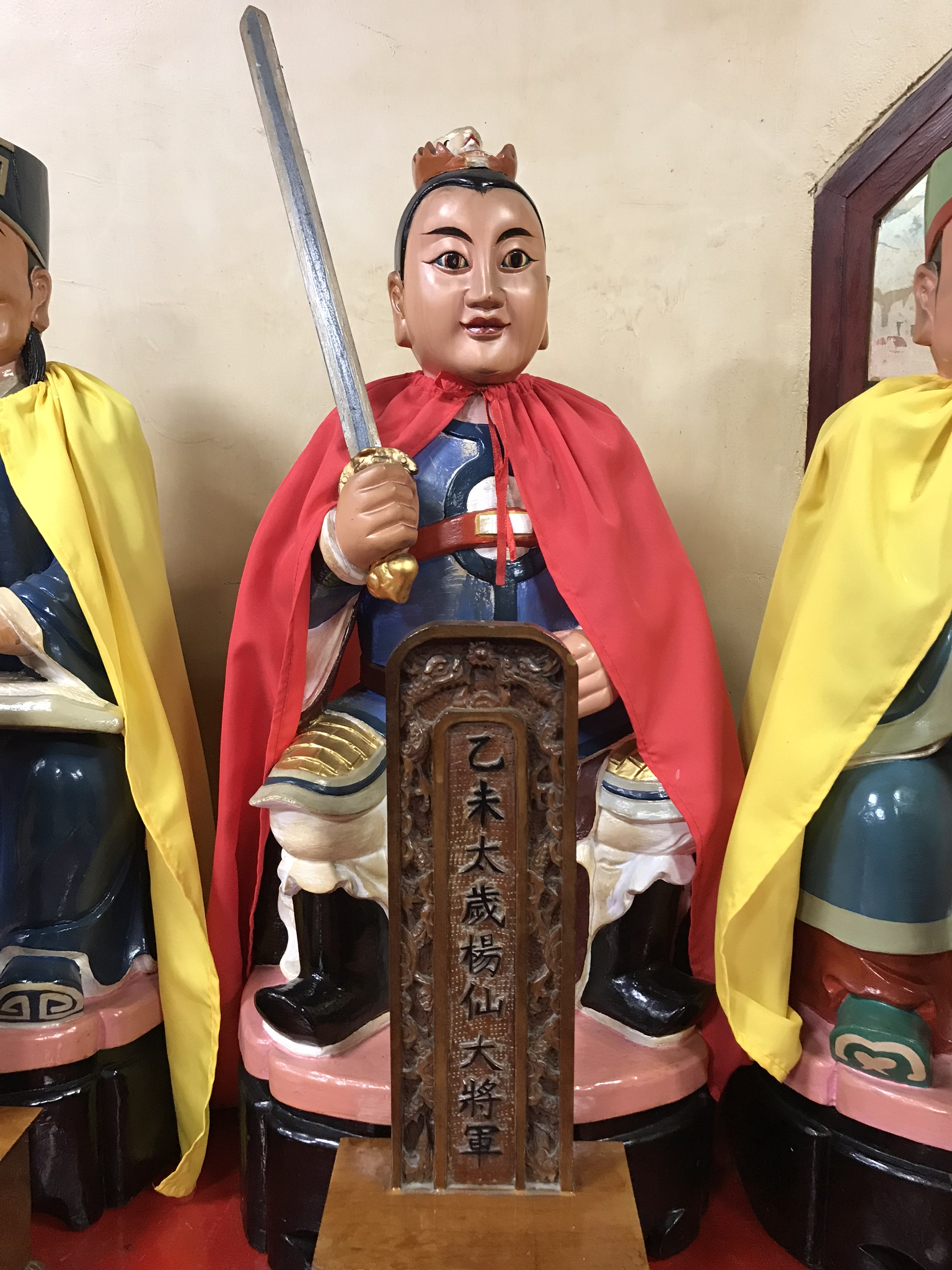 乙未太歲楊仙大將軍神像